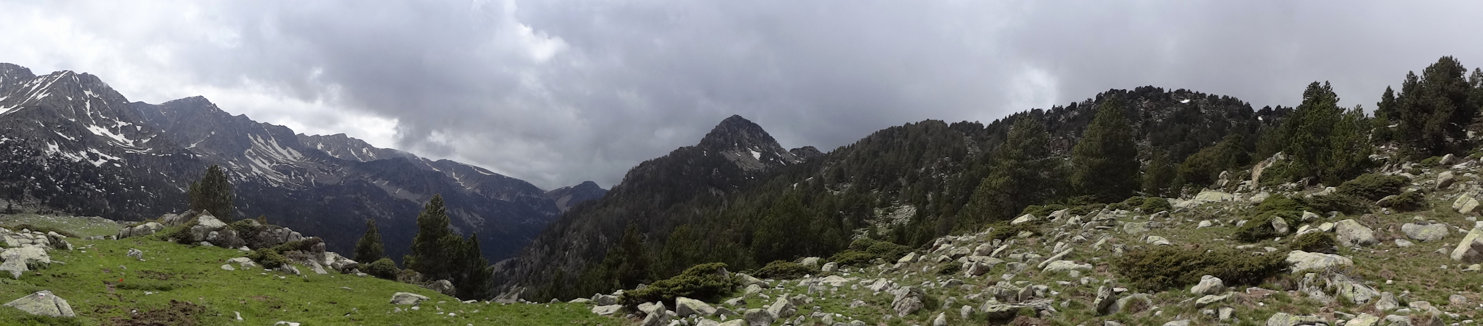 Vall del Madriu-Perafita-Claror. Camí de gran recorregut GR-11. This is a a photo of a natural area in Andorra with id: AD-VMPC